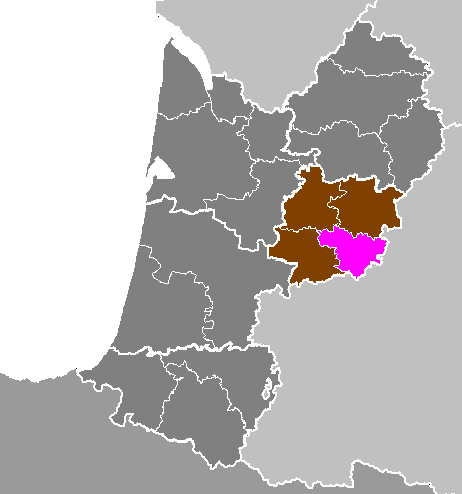 Maps of arrondissements and cantons of France: Département de Lot-et-Garonne - Arrondissement d Agen.PNG (Région Aquitaine)